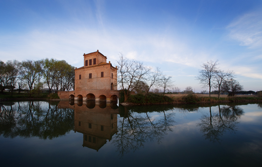 Via Boschetto (strade interpoderali ex ERSA) This is a photo of a monument which is part of cultural heritage of Italy.